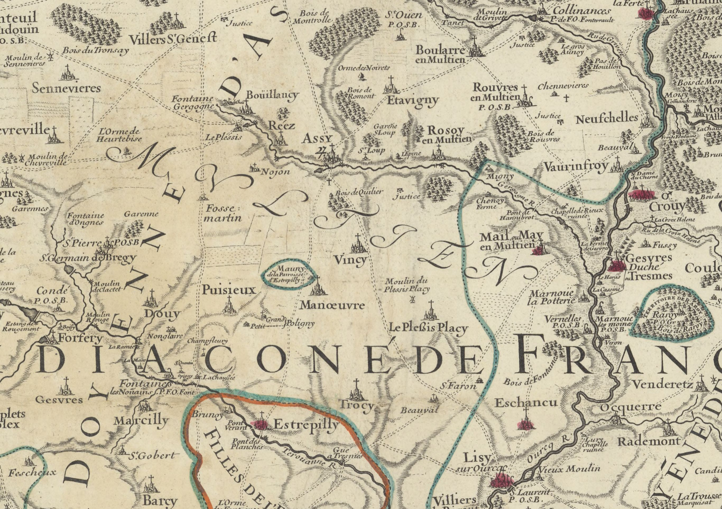 Une partie du Multien, doyenné d'Acy en 1717.